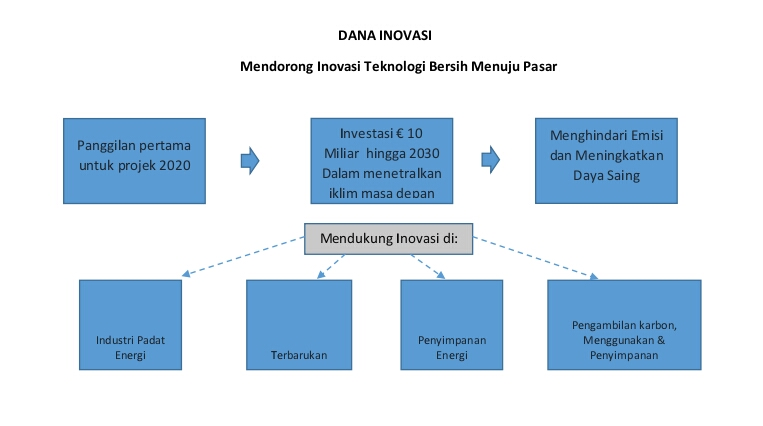 Alur Dana Inovasi Unia Eropa